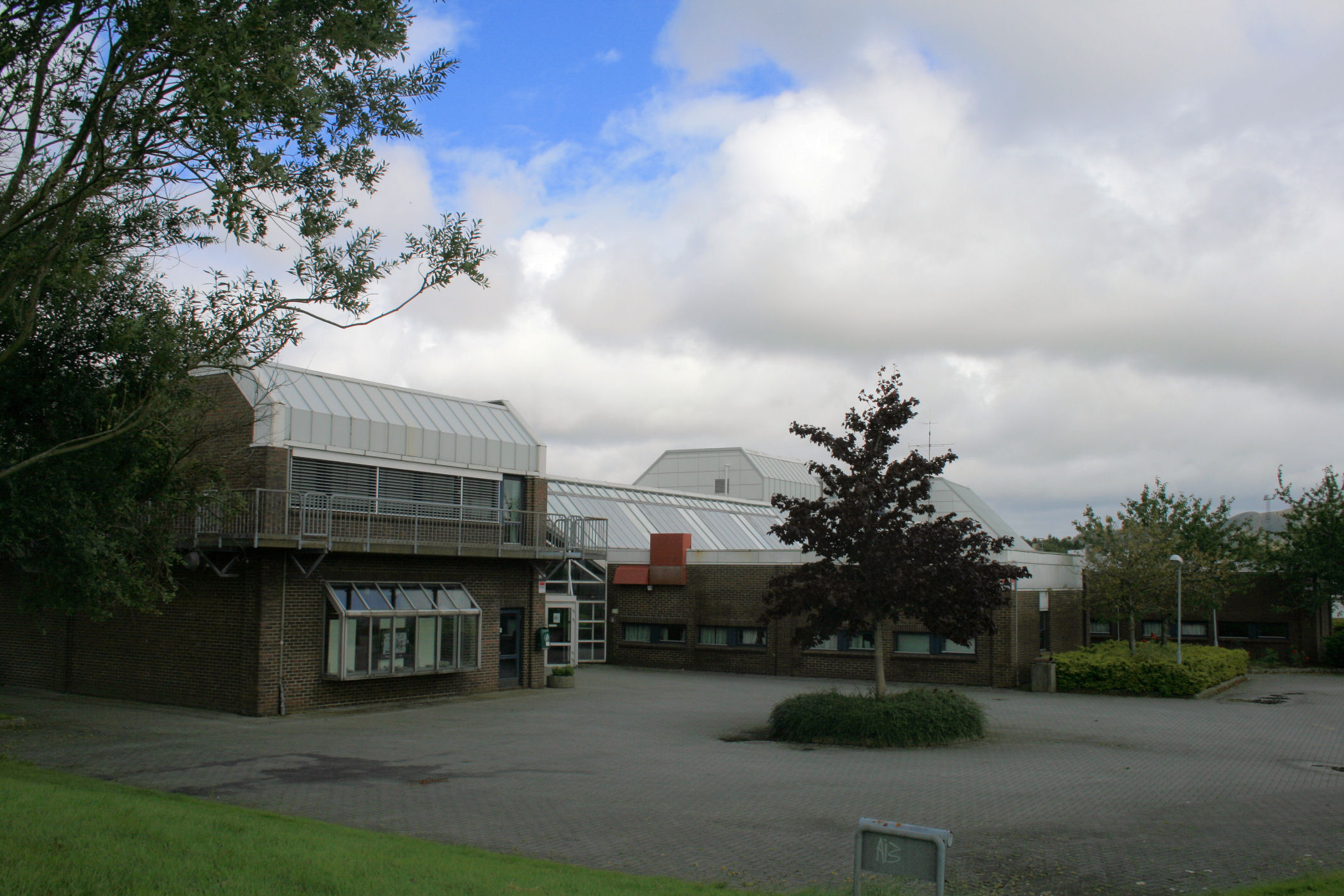 Lundehaugen videregående skole